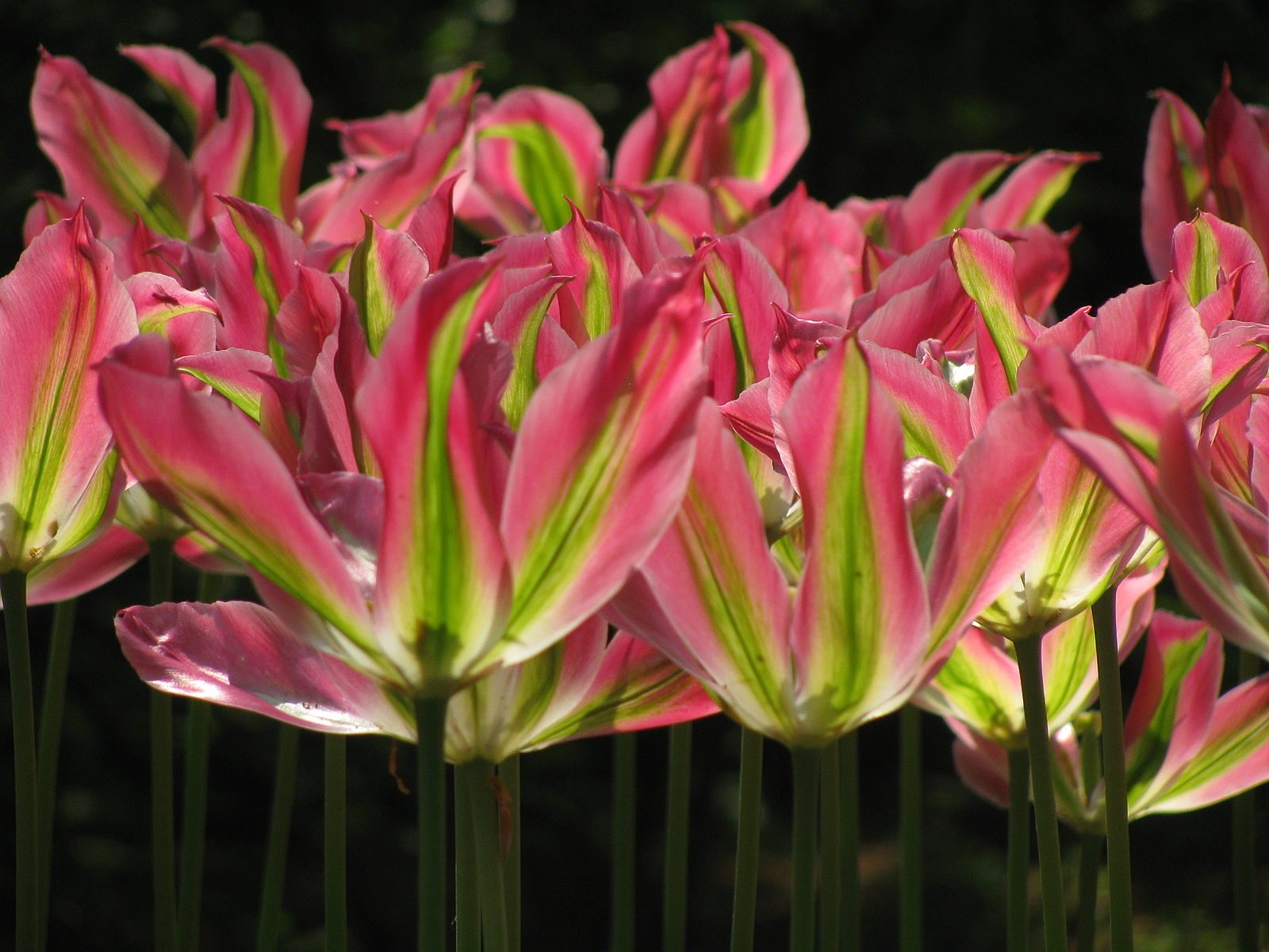 Keukenhof